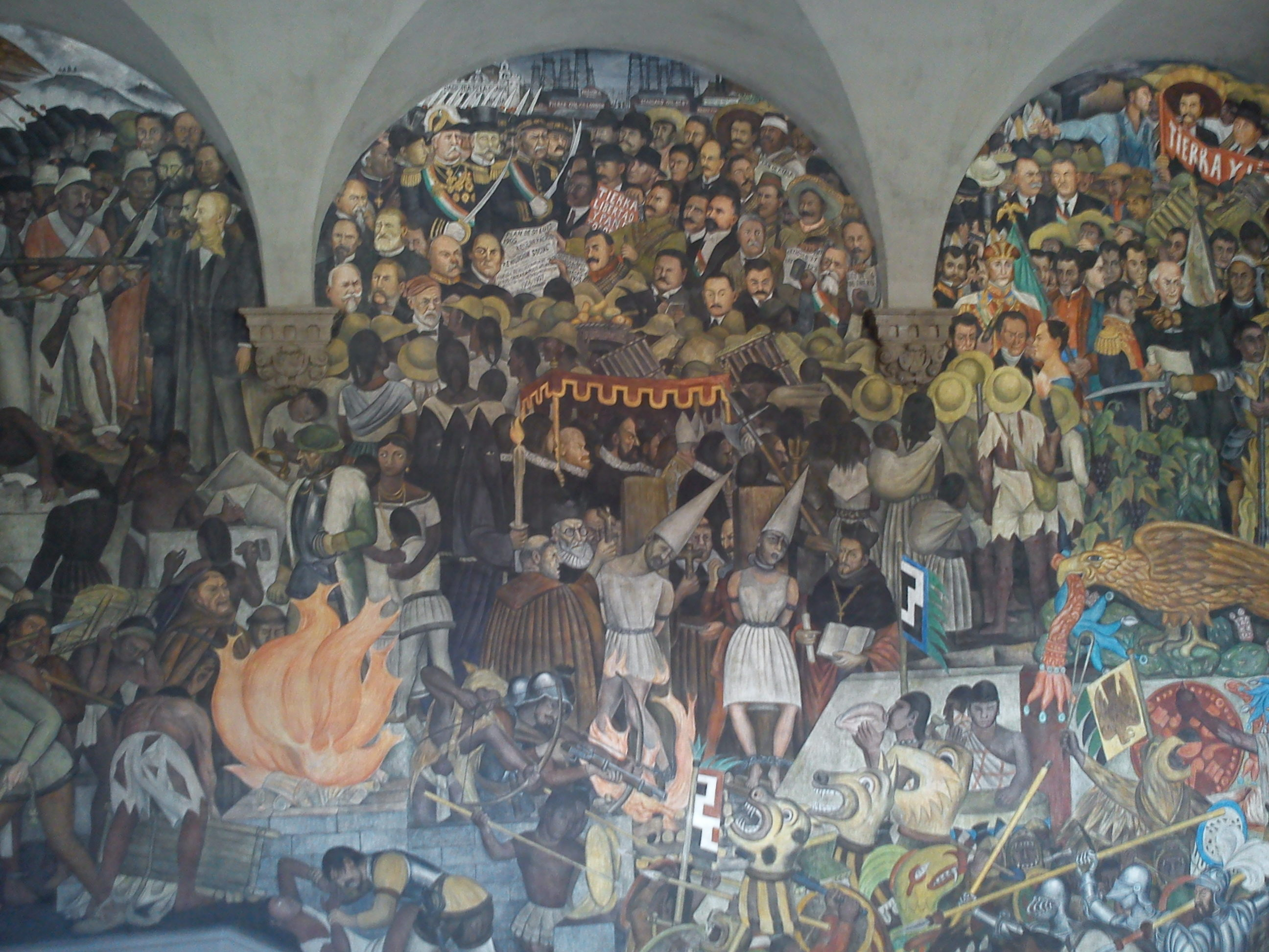 Palacio Nacional